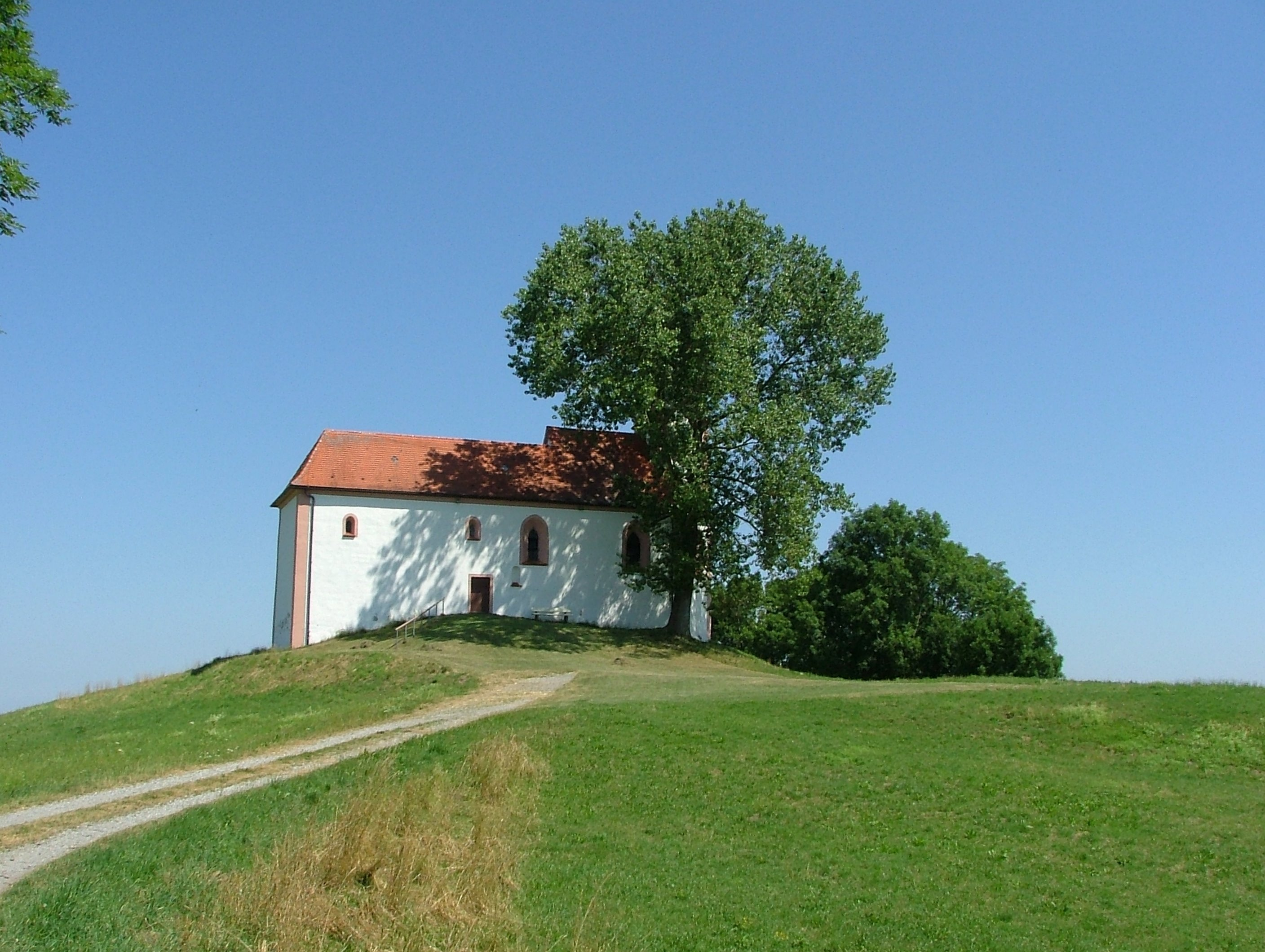 Volkertshaus